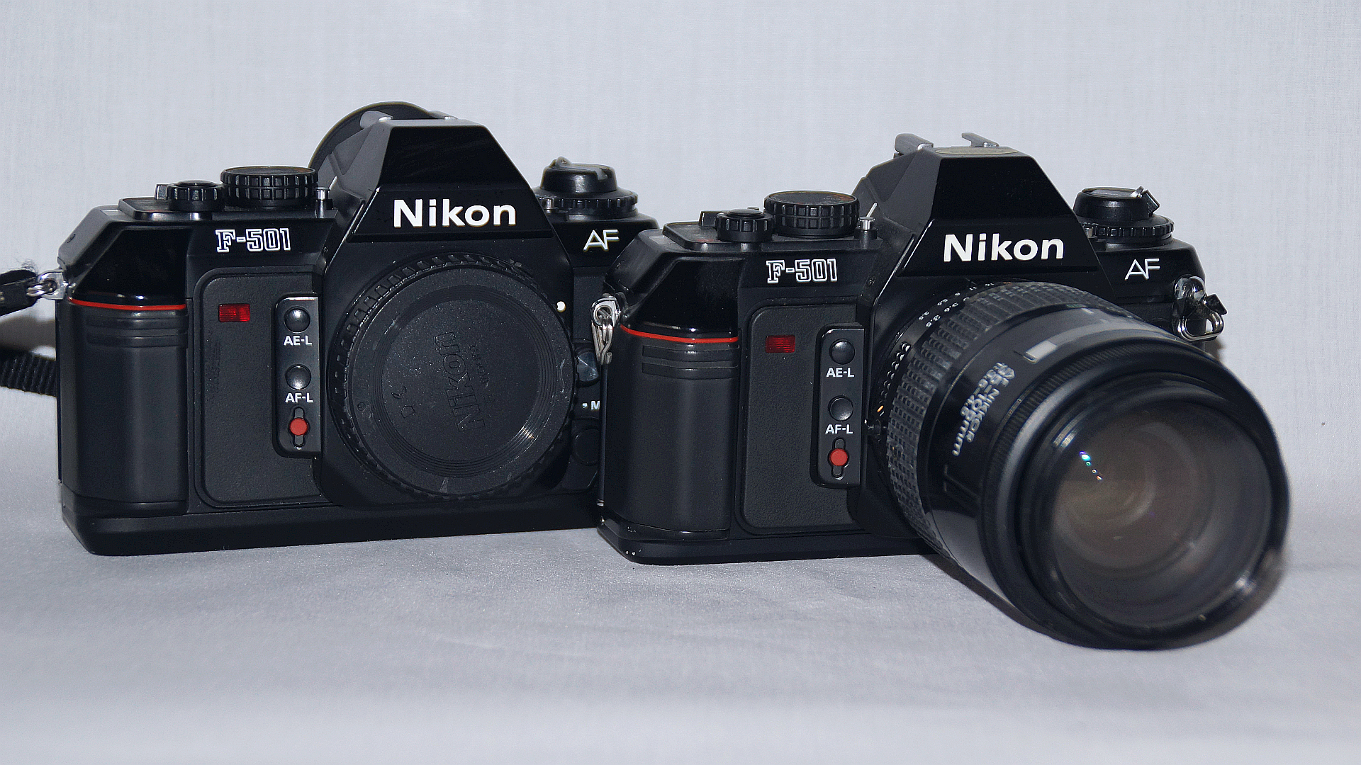 Nikon F-501 mit Nikkor AF 1:3.5-4.5/35-105mm, Foto Wolfgang Pehlemann DSC04854